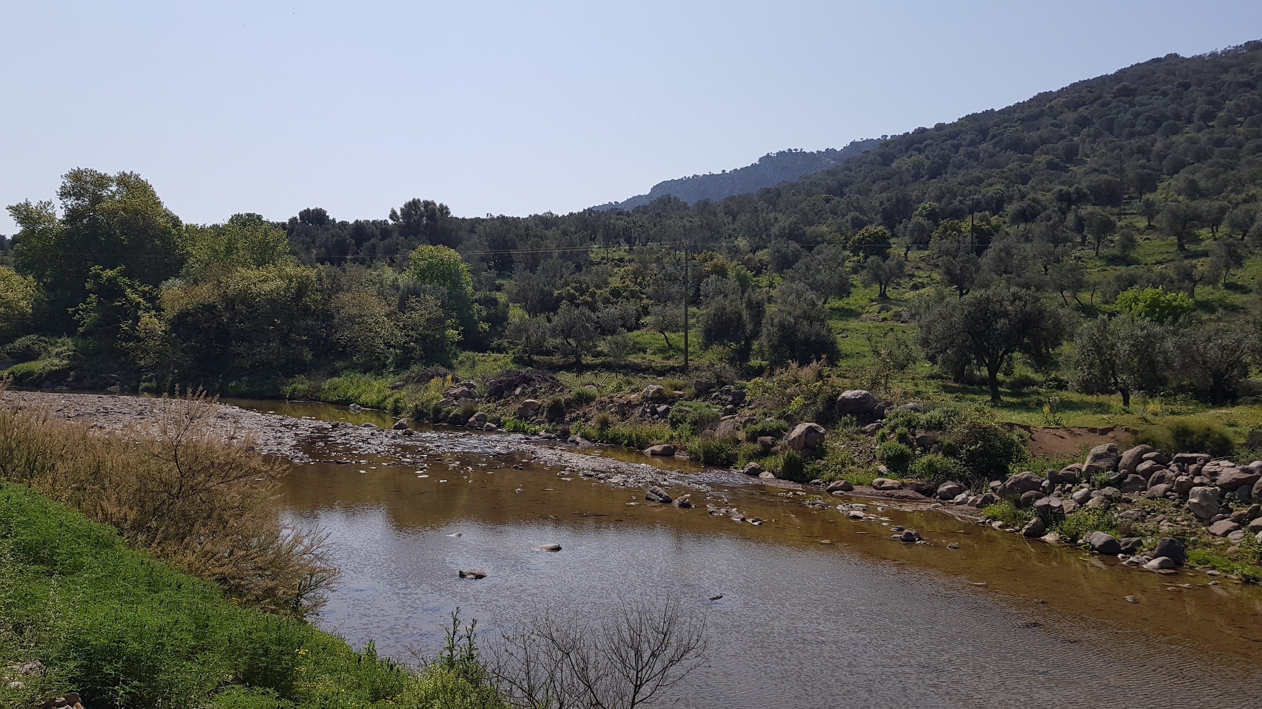 Η ποταμιά είναι ρεύμα που κατεβαίνει από το λόφο Καρύδι κοντά στο χωριό Ανεμώτια και χύνεται στον κόλπο της Καλλονής στην περιοχή "Καραβούλια" This is a photography of Natura 2000 protected area with ID GR4110007